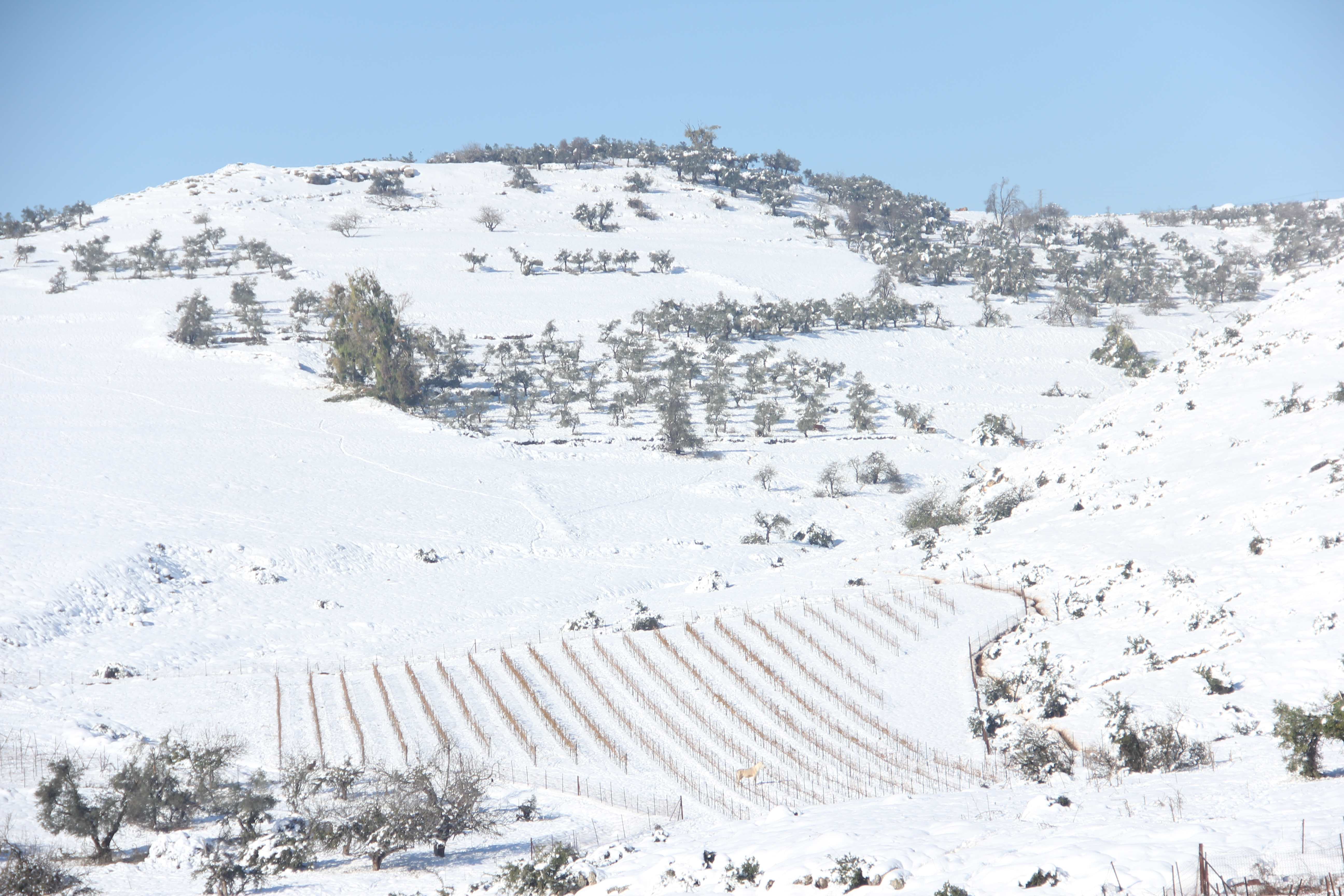 כרם מושלג במושב דלתון